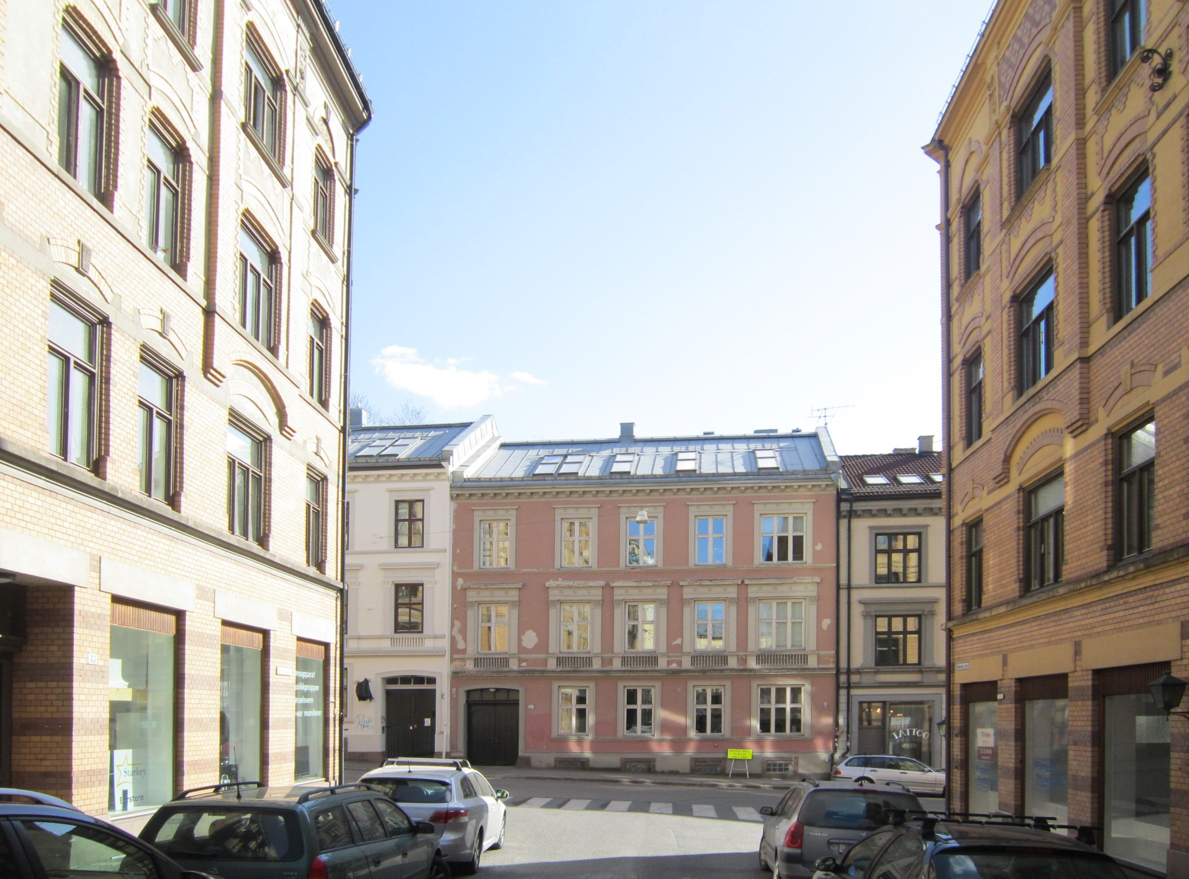 Bidenkaps gate i Oslo